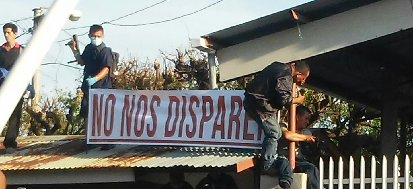 Un grupo de estudiantes sostienen una pancarta con el texto "NO NOS DISPAREN" en alusión a los policias y las muertes causadas durante las protestas